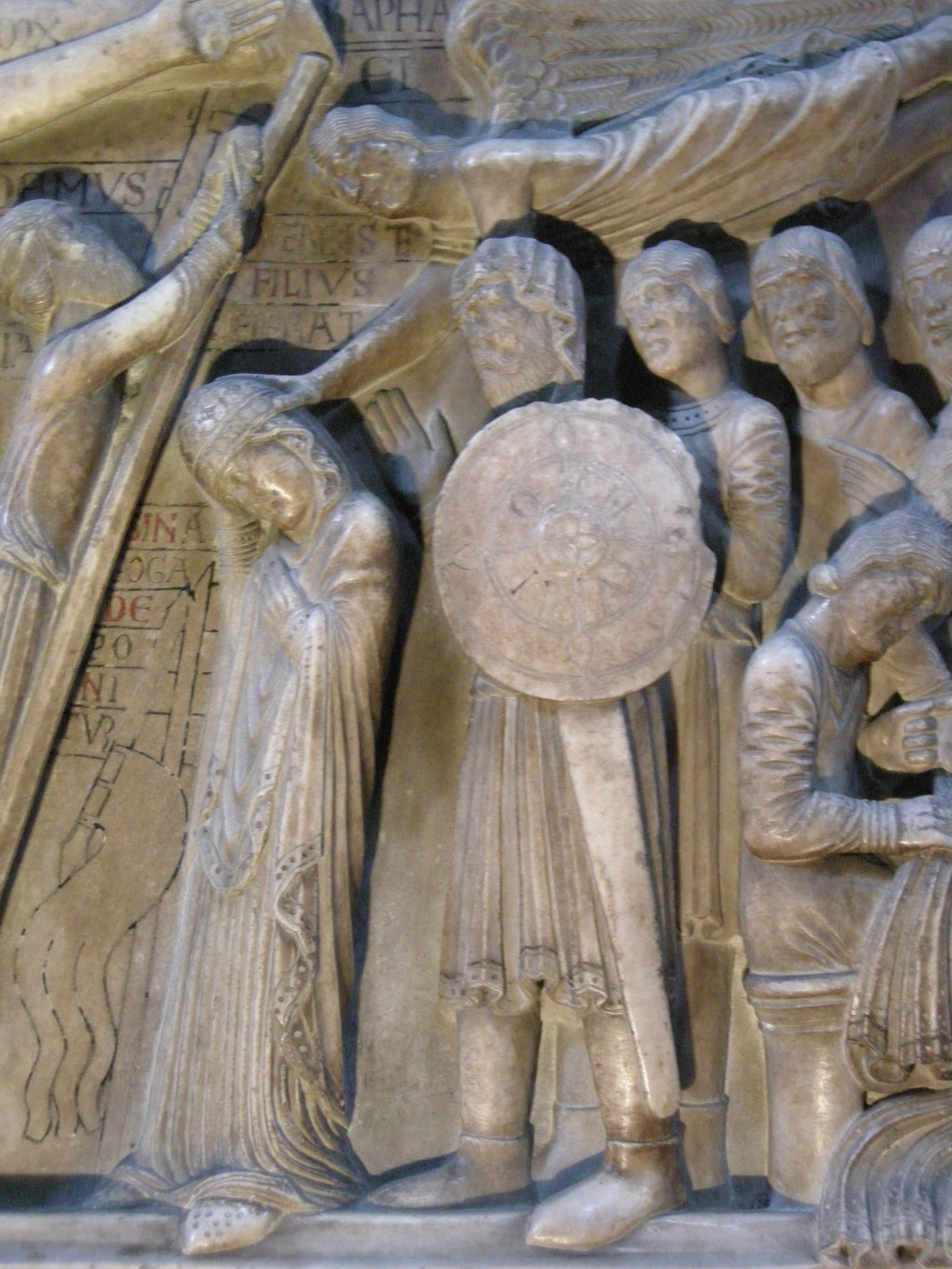 Deposizione dalla croce di benedetto antelami